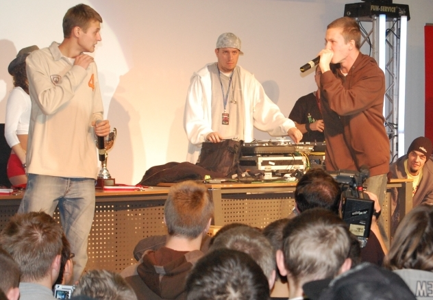 Muflon miażdży Pogo na PGA 2007